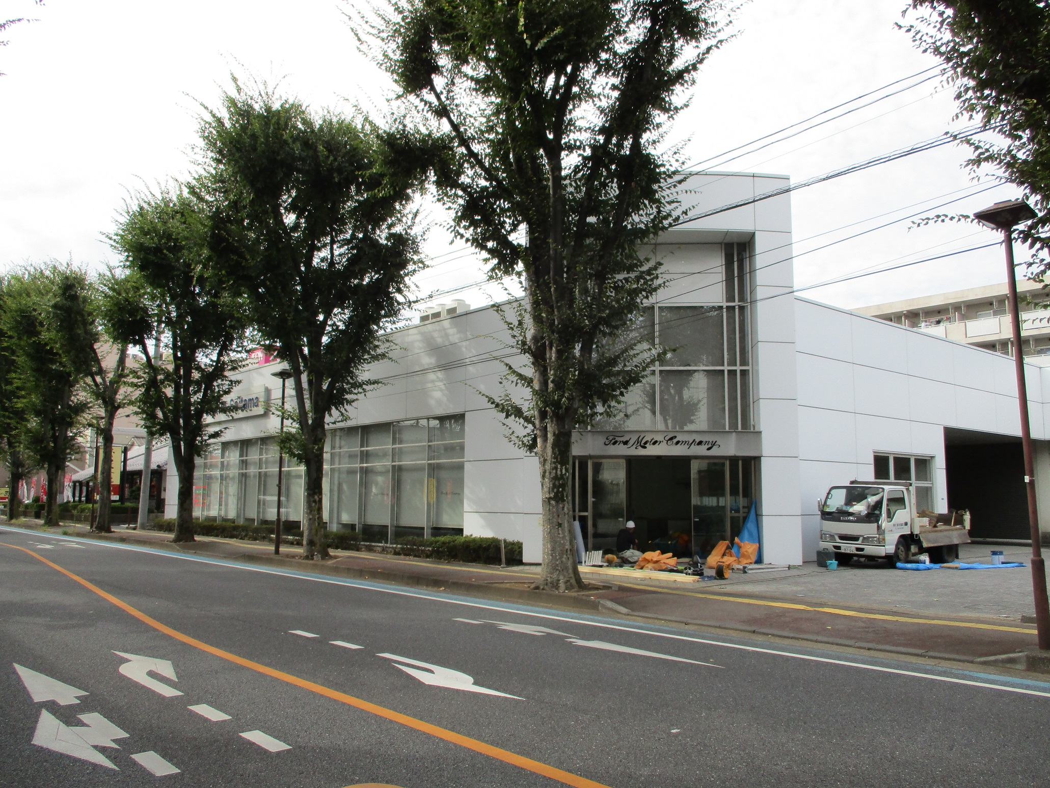 投稿者本人による撮影